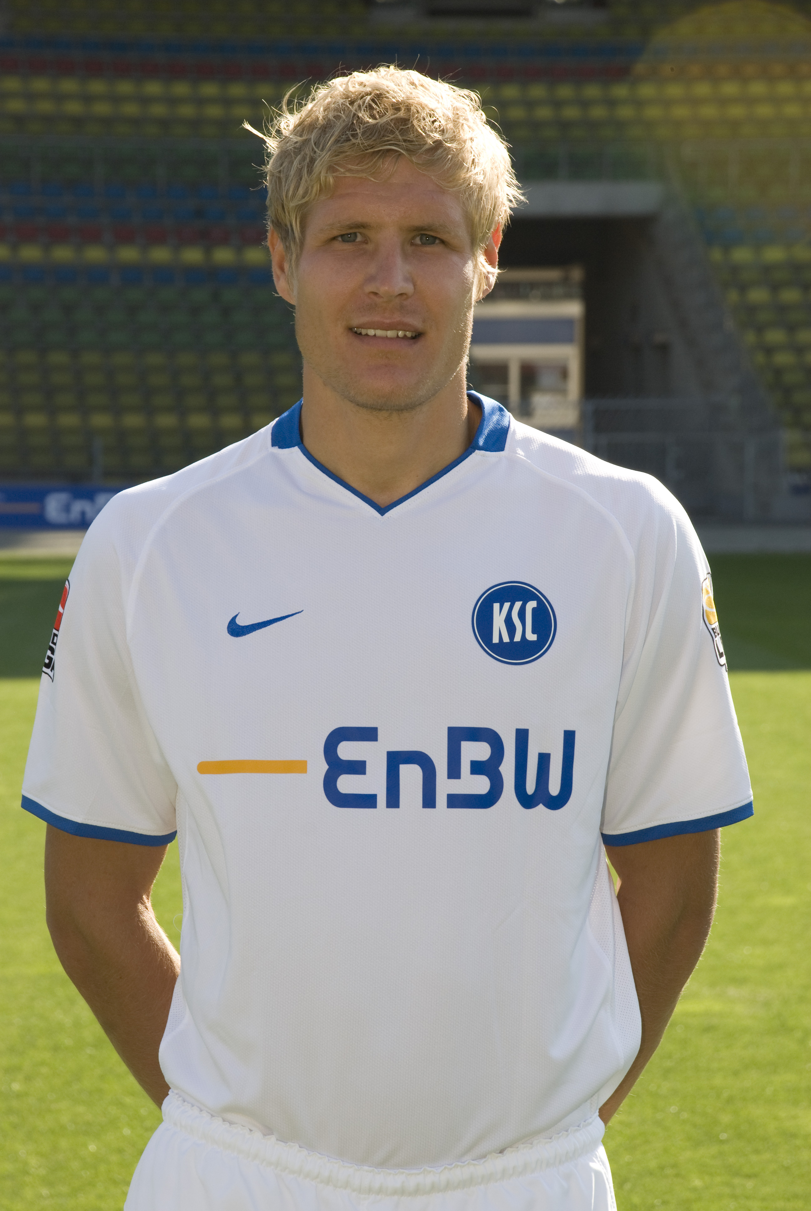 Niklas Tarvajärvi